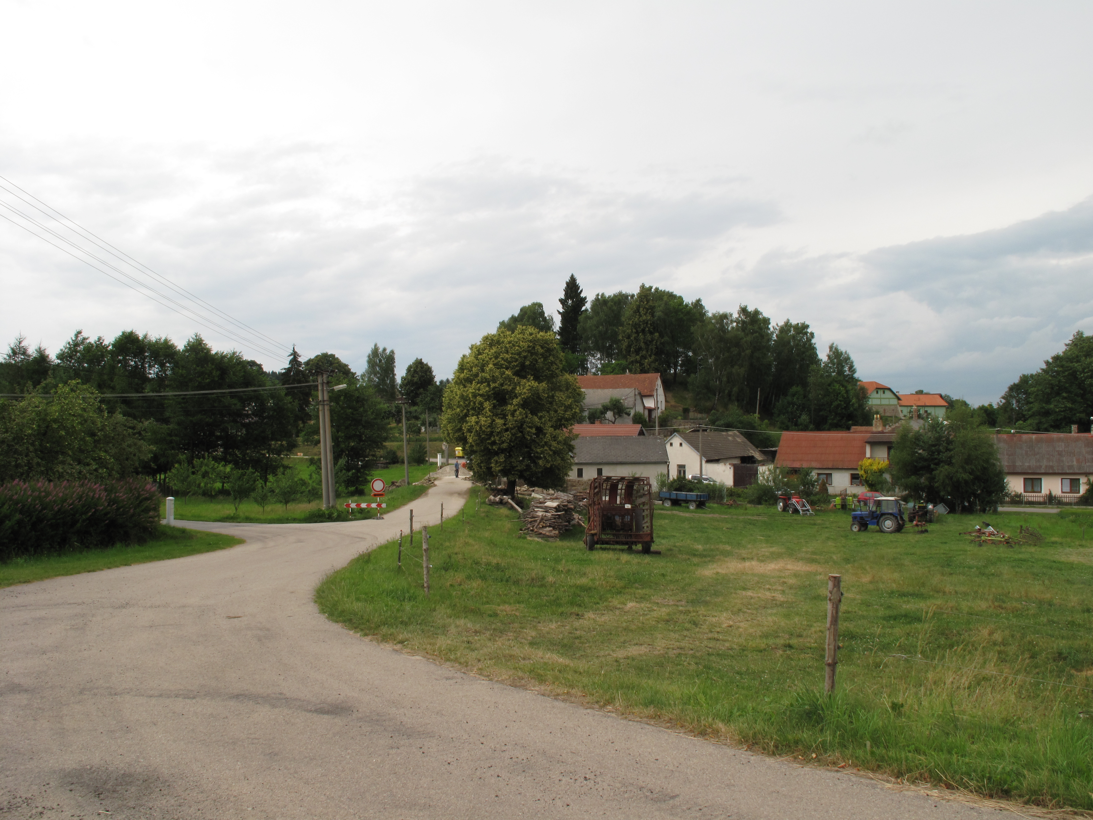 Cesta v Horní Vsi. Okres Pelhřimov, Česká republika.